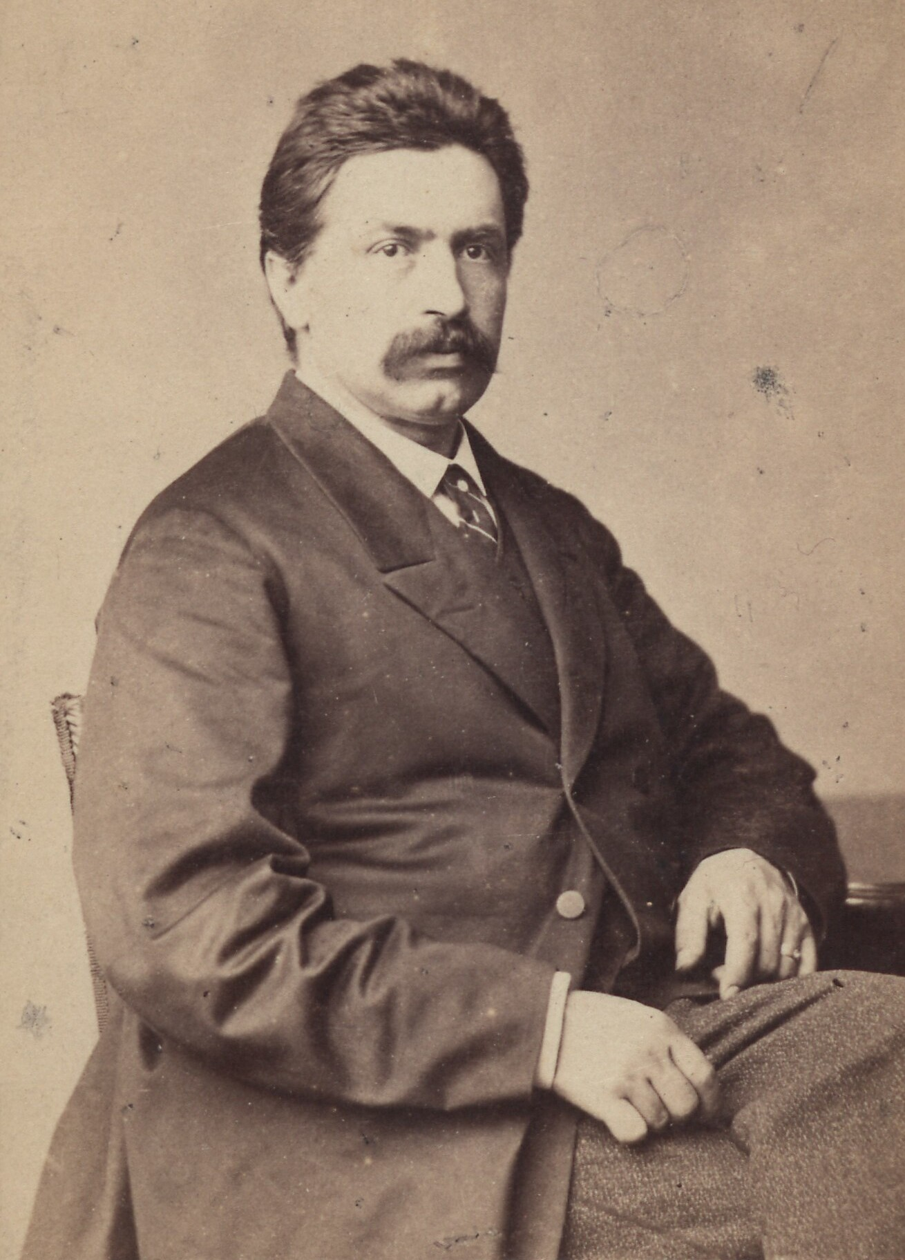 gen. Edmund Różycki, ok. 1886